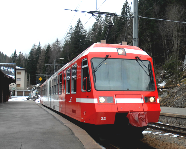 Transports de Martigny et Régions (TMR) treinstel BDeh 4/8 22 (823/824) op 6 februari 2007 te Le Châtelard VS